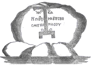 Борисов камень у Дисны.